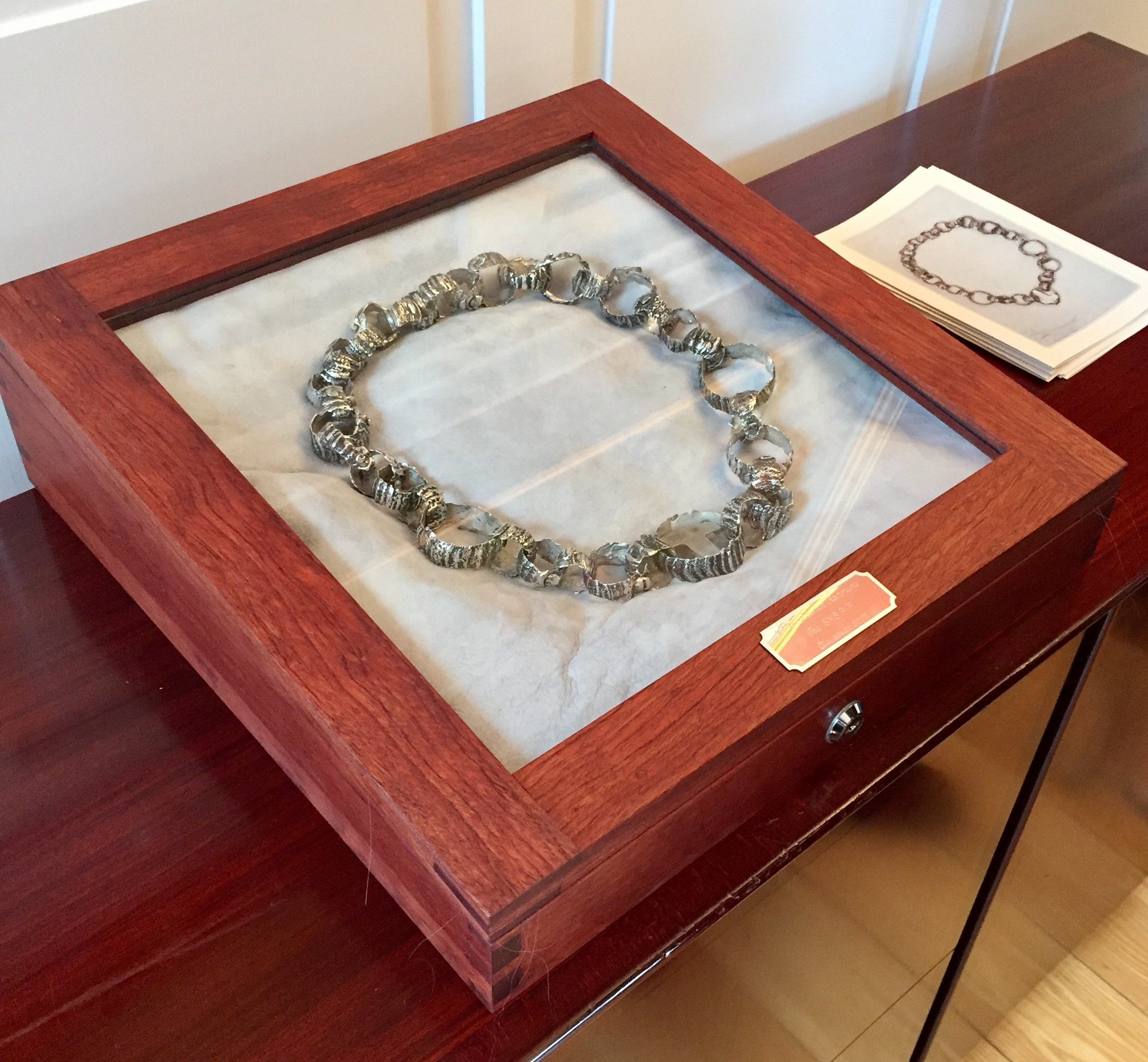 Thorshavns borgmesterkæde Føroyskt: Borgarstjóraketa Tórshavnar